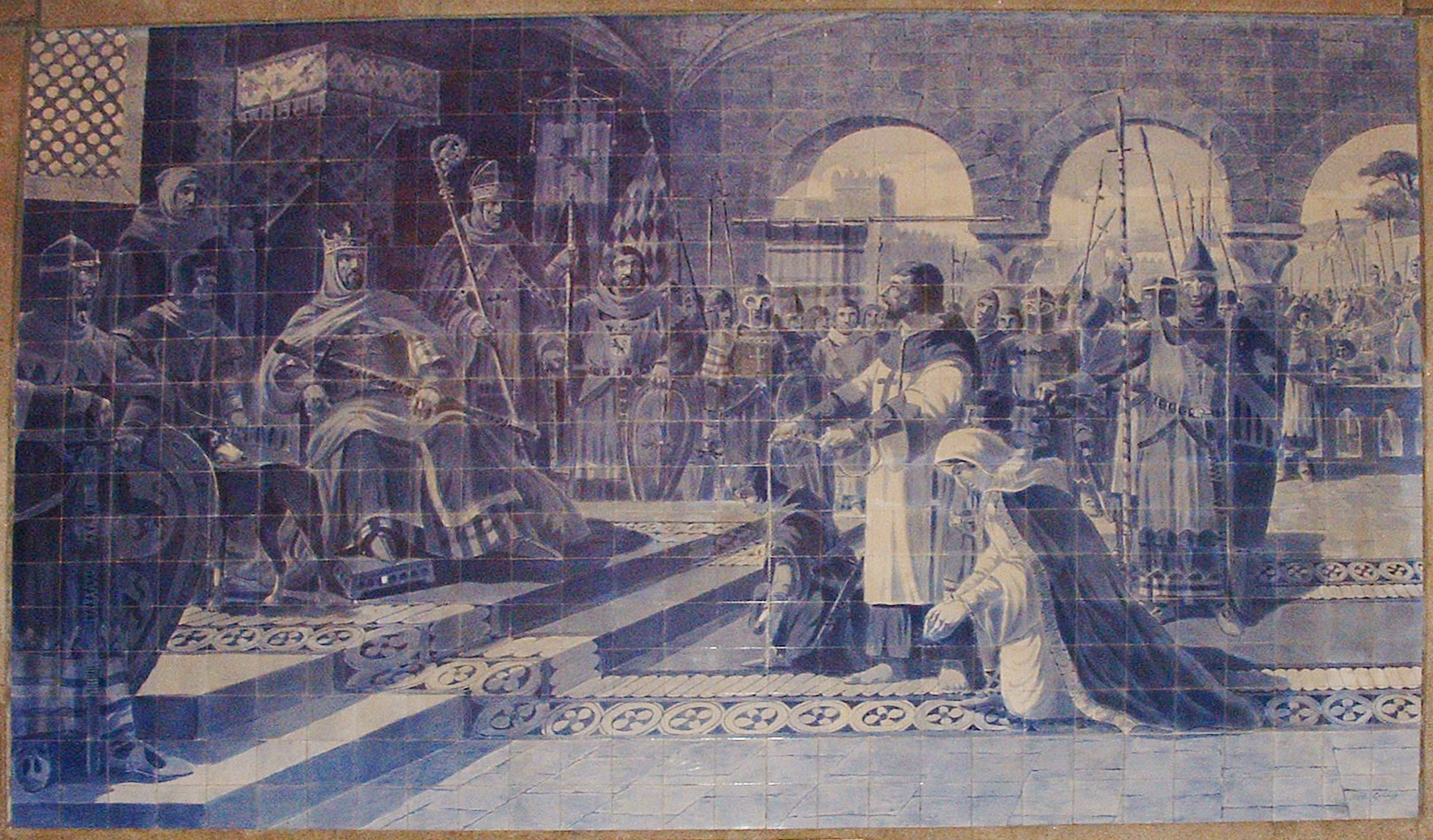 Description